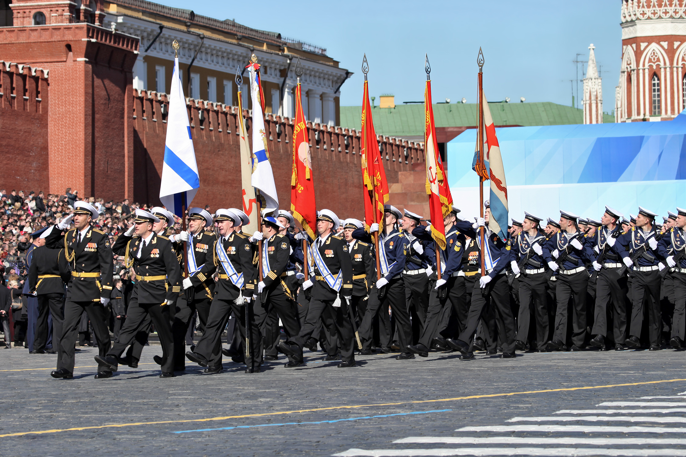 Военный учебно-научный центр ВМФ Военно-морская академия (Navy Academy)